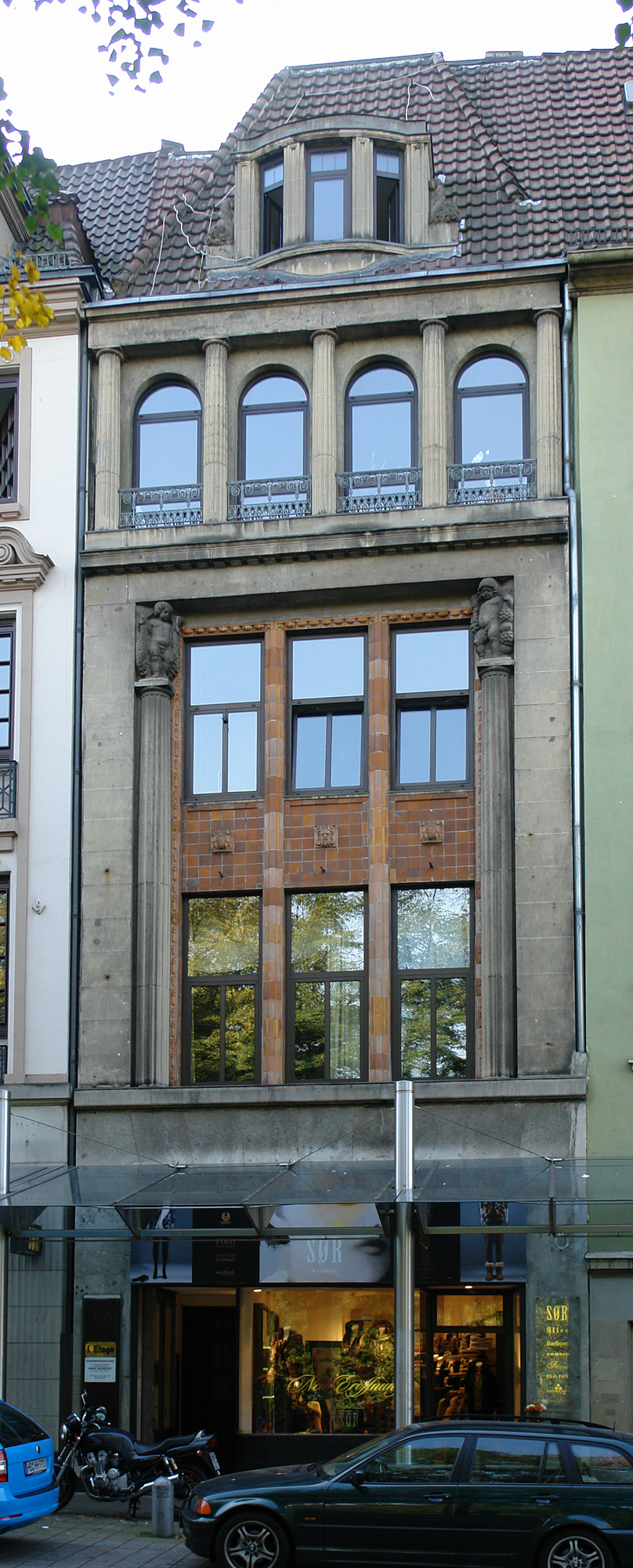 Geschäftshaus Walter in Bremen, Am Wall 148.Das abgebildete Objekt ist ein geschütztes Kulturdenkmal in der Freien Hansestadt Bremen, mit der Nr. 0080 beim Landesamt für Denkmalpflege registriert.